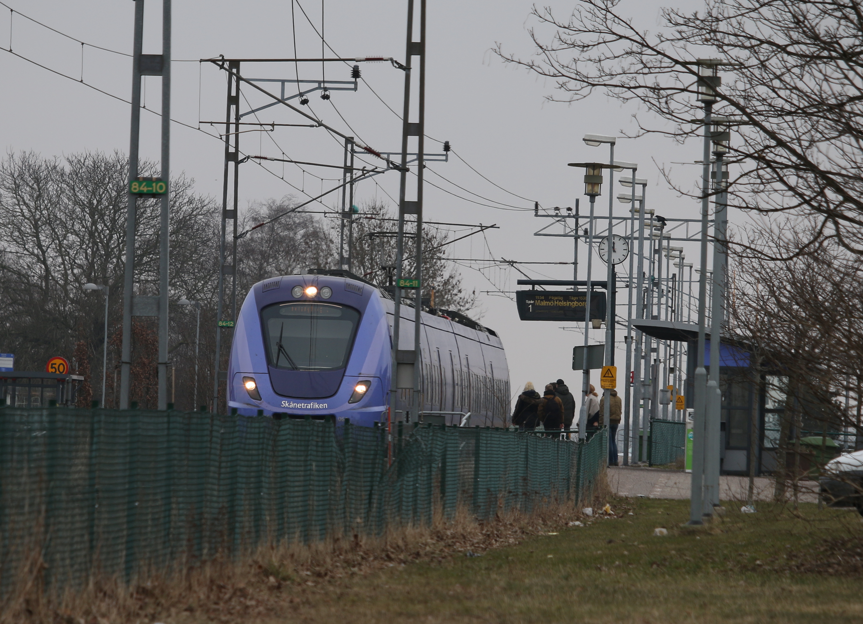 Gärsnäs station